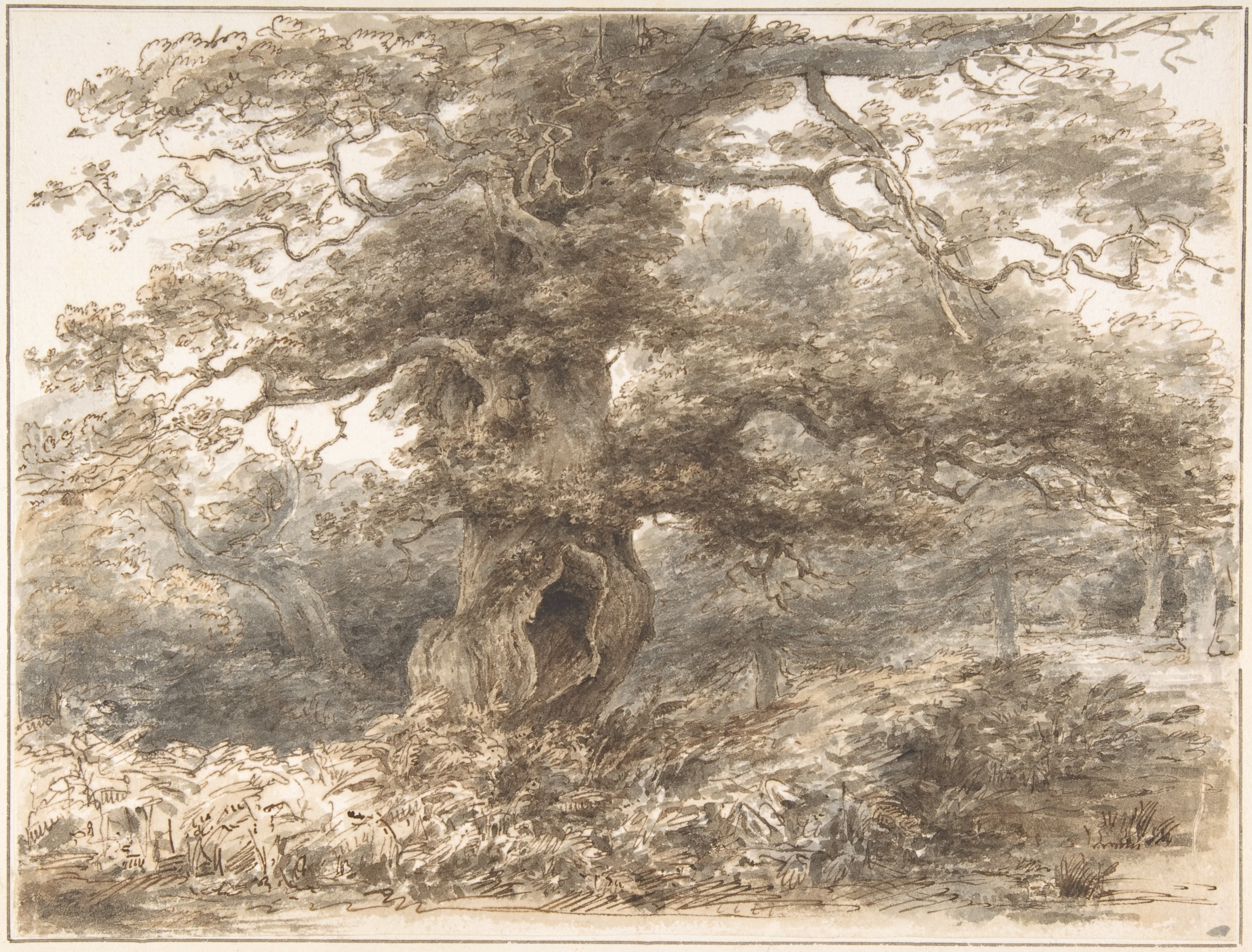 Drawing; Drawings